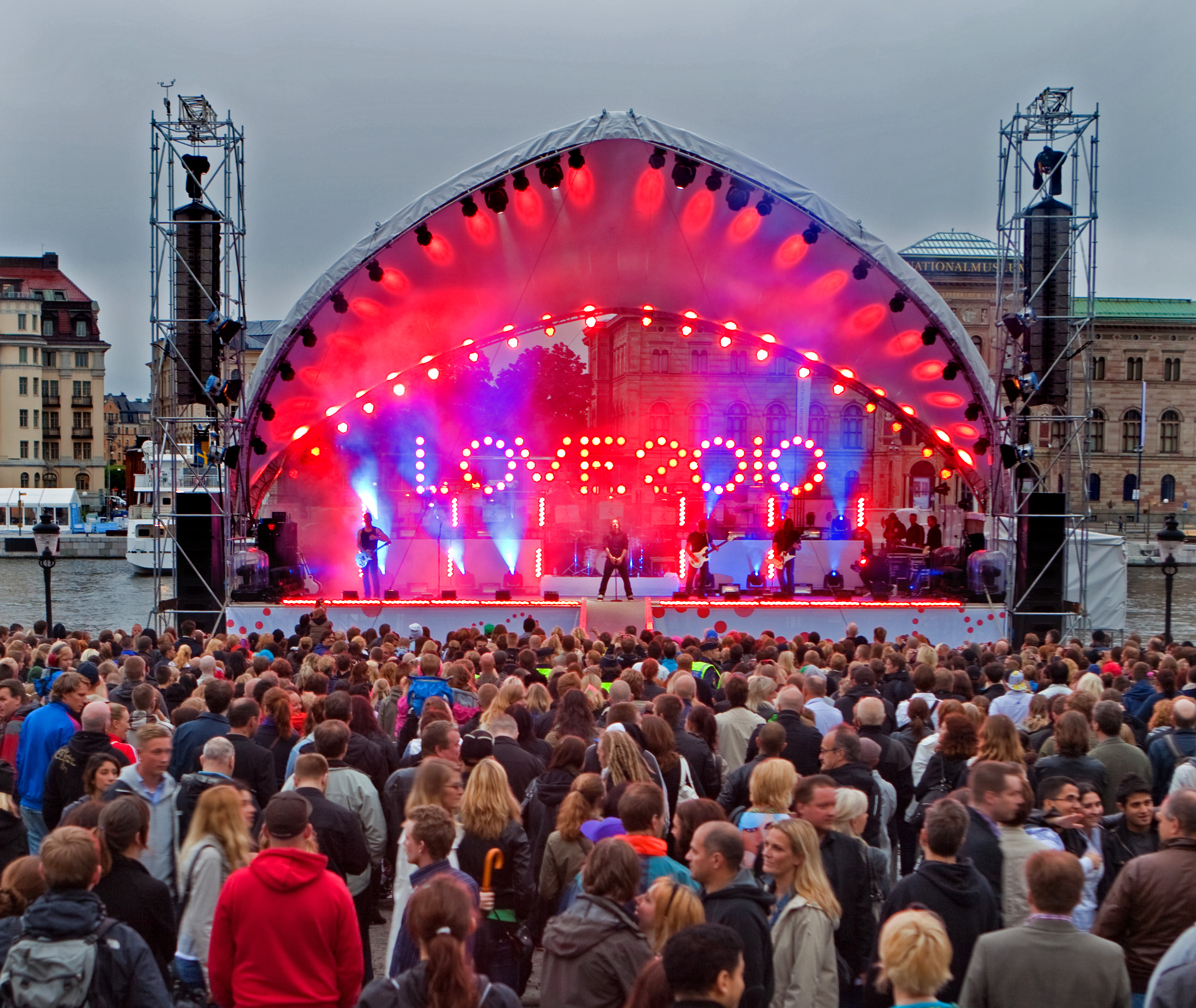 LOVE Stockholm 2010, Takida med Robert Pettersson